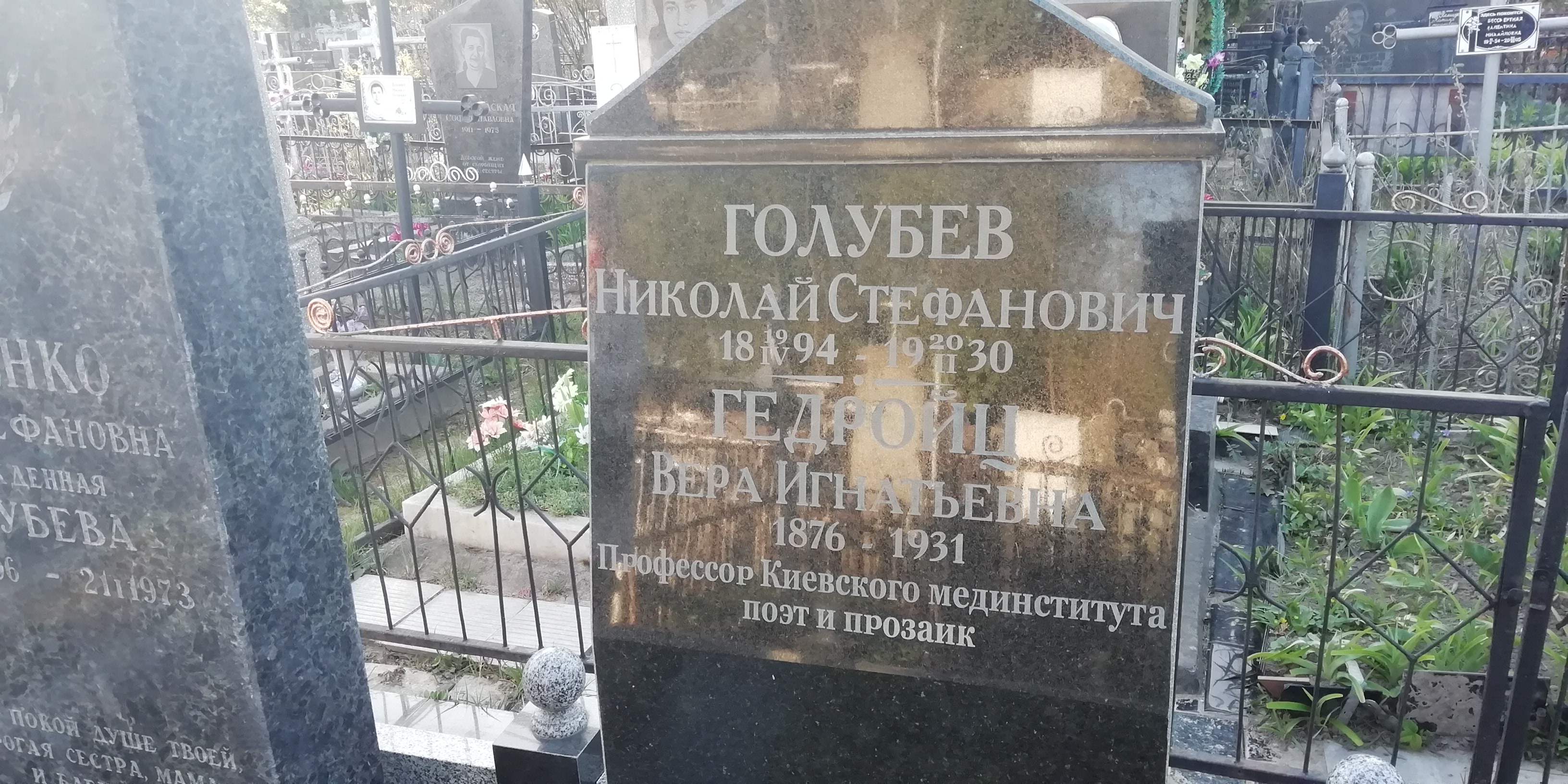 Могила В.Гедройц по состоянию на Апрель 2020 \ Gedroiz Vera tomb at April 2020